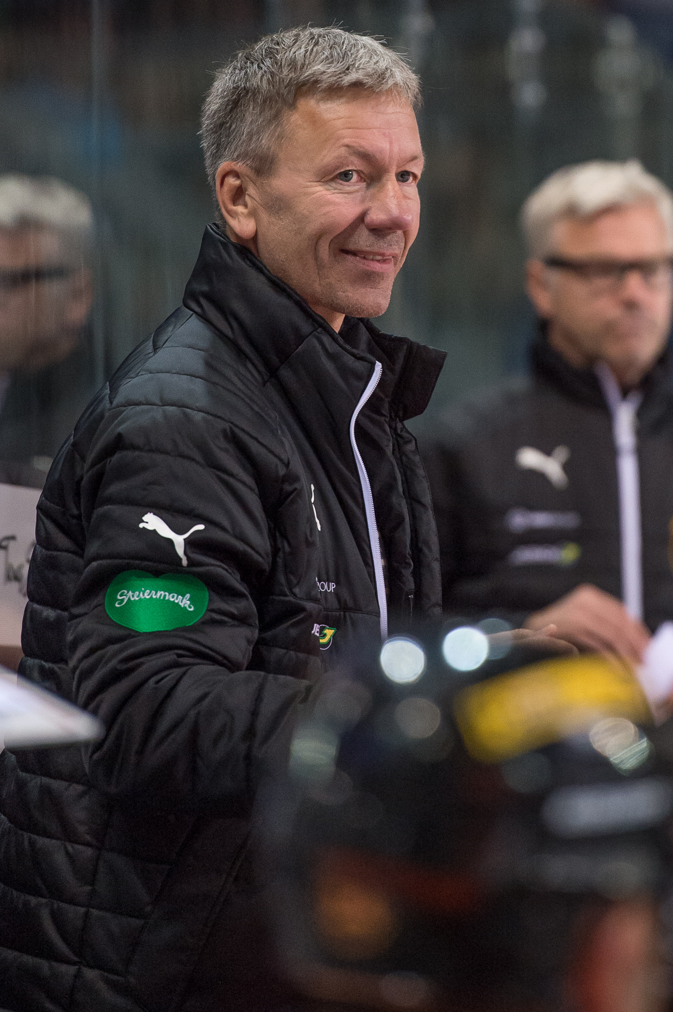 Arena Nürnberger Versicherungen,Eishockey,Mercedes-Benz Rent Cup 2015,Moser Medical Graz 99ers,Todd Bjorkstrand